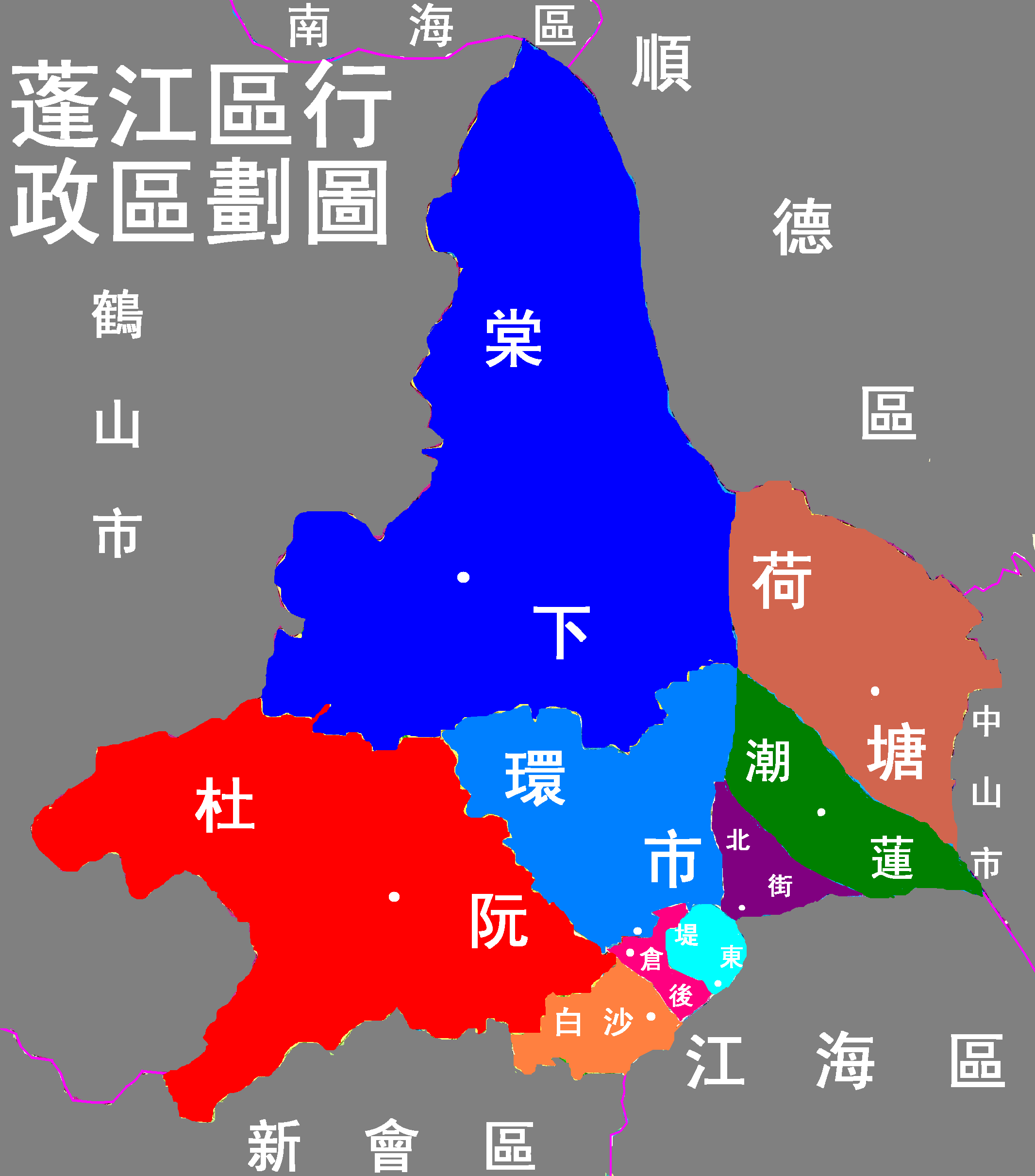 蓬江區行政區劃圖